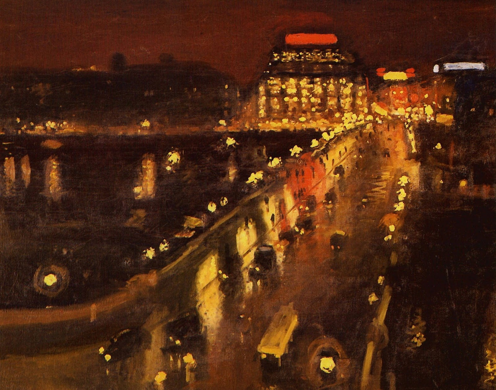 Painting by Albert Marquet